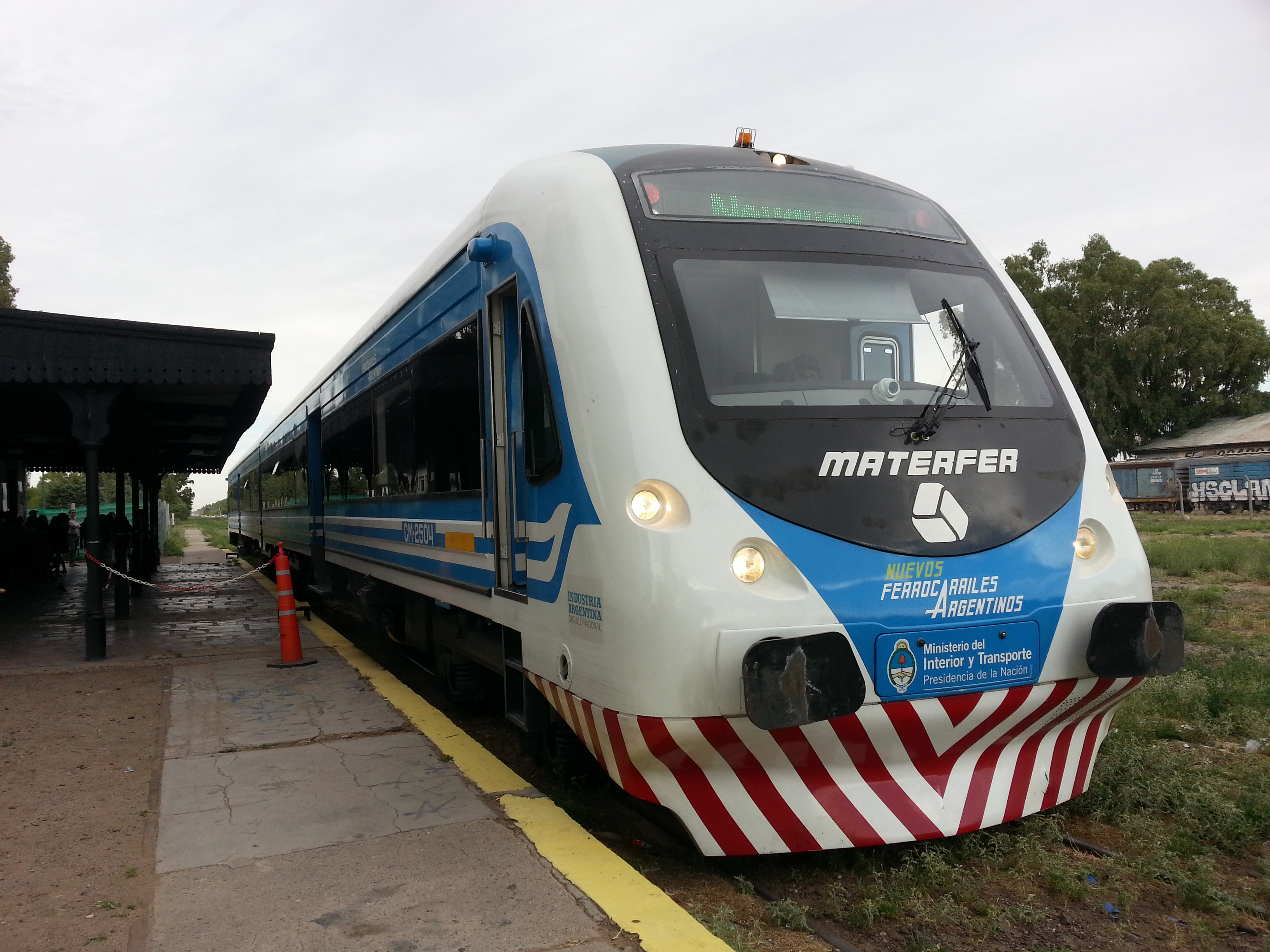 Coche motor Materfer detenido en Cipolletti